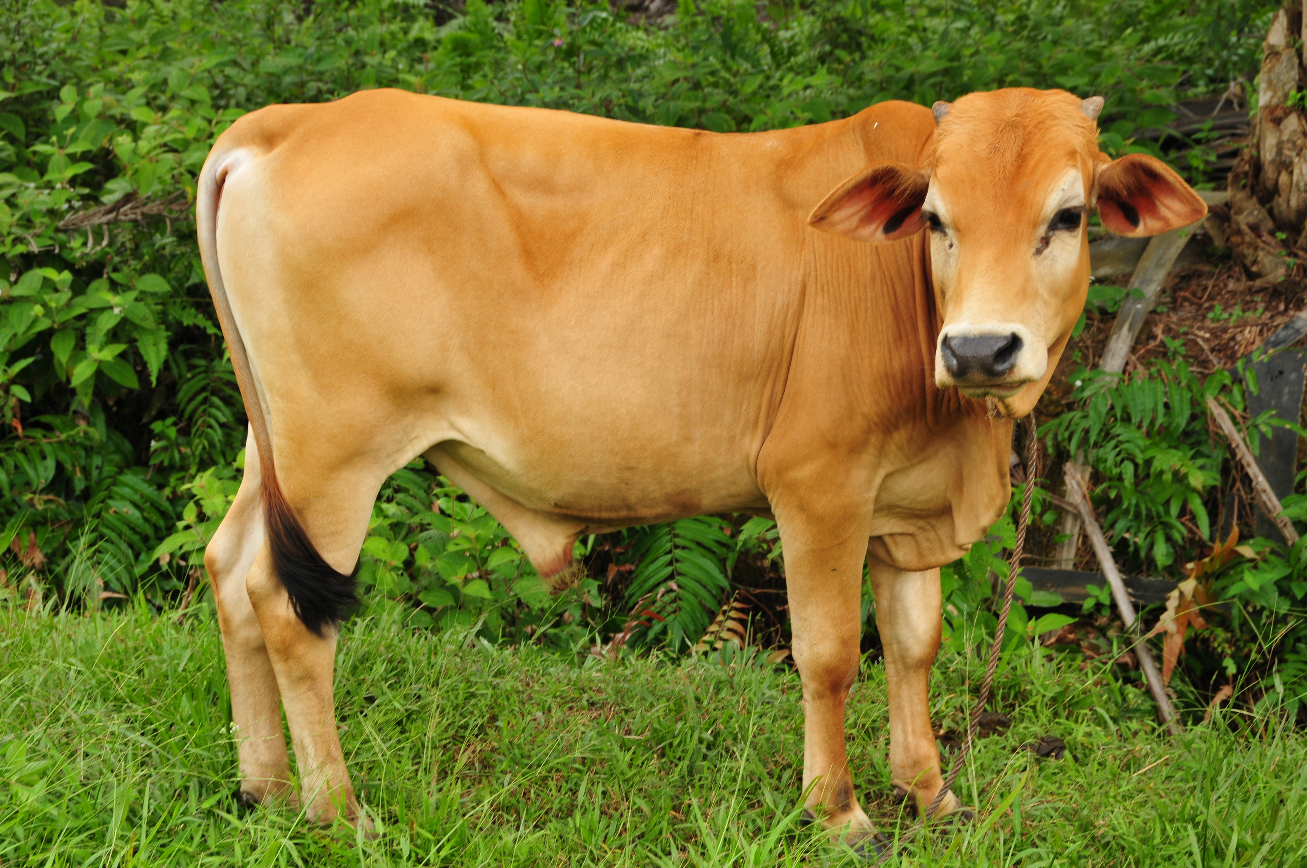 Lembu tempatan di Malaysia.